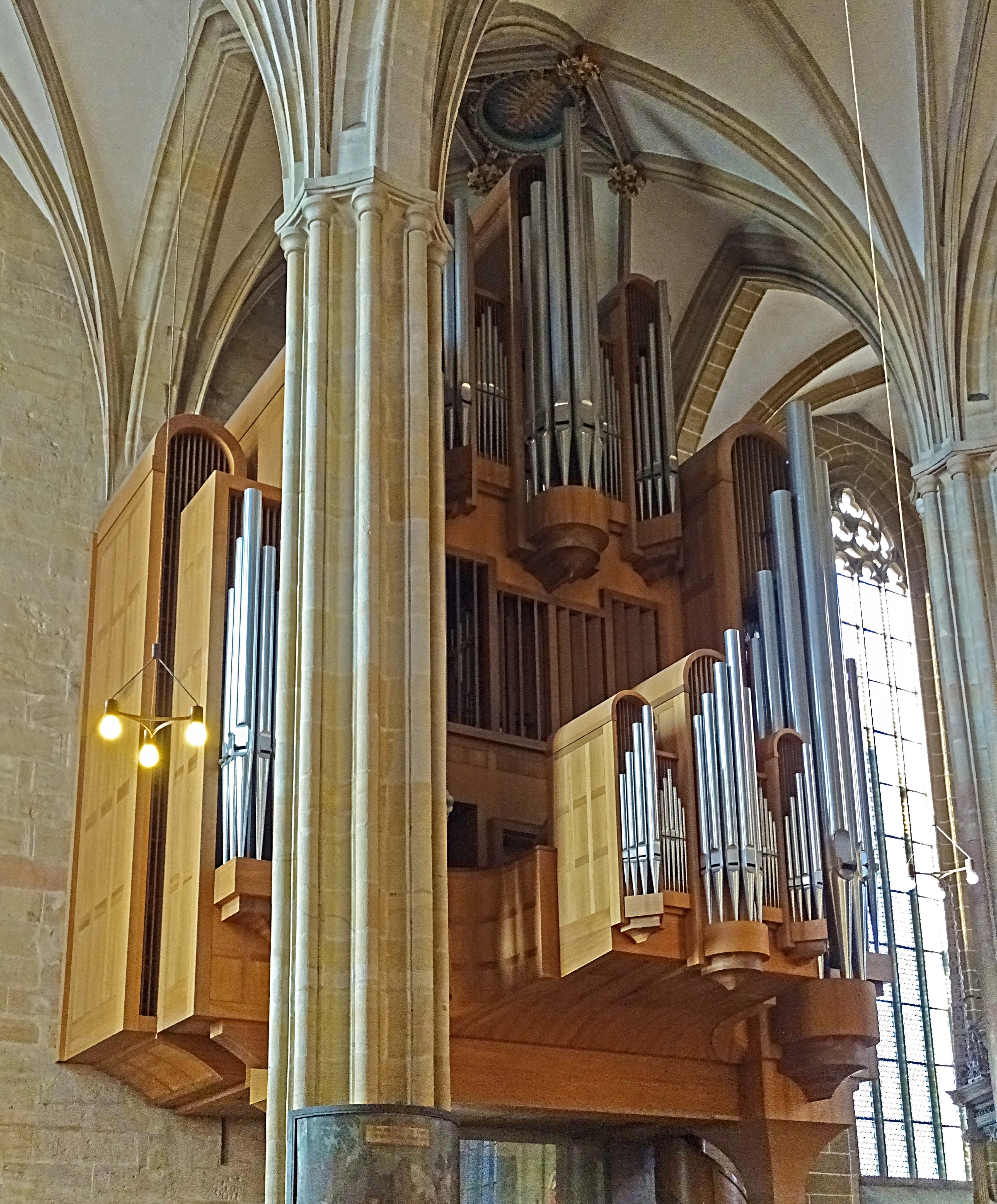 Hauptorgel von Schuke Orgelbau (1992 III/P63) mit Teilen der Vorgängerorgel (Klais 1906) im Erfurter Dom St. Marien